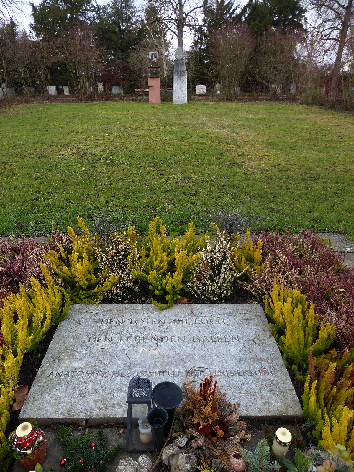 Skulpturen «Frau mit Weihgabe und Wächter» von Helene Balmer-Gerber (1924) auf dem Gedenkfeld des Friedhof Hörnli, Riehen, Basel-Stadt